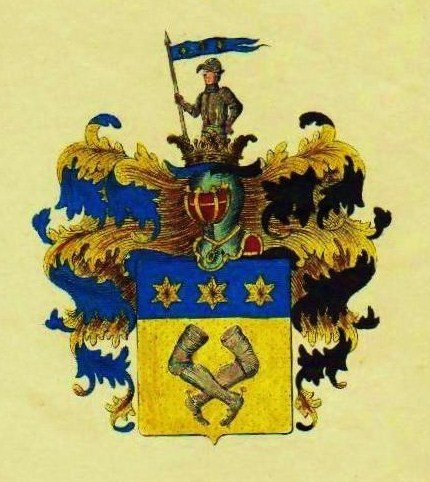 Familienwappen derer von Leers handkolorierte Lithographie mit Untertitel "von Leers."